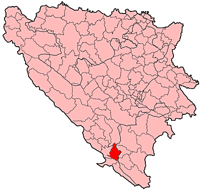 Prikaz općine Stolac u Bosni i Hercegovini